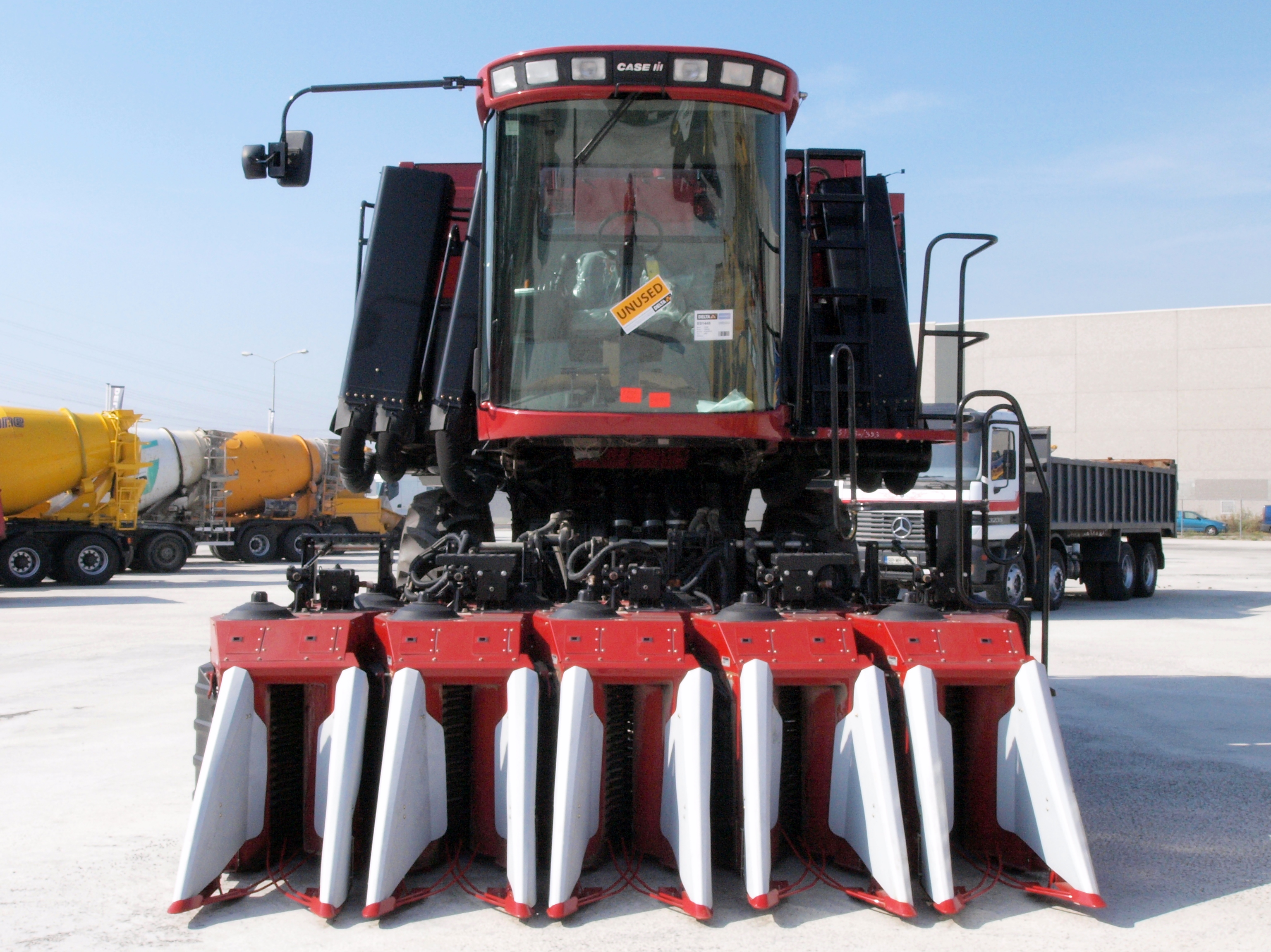 Case 420 Cotton Express